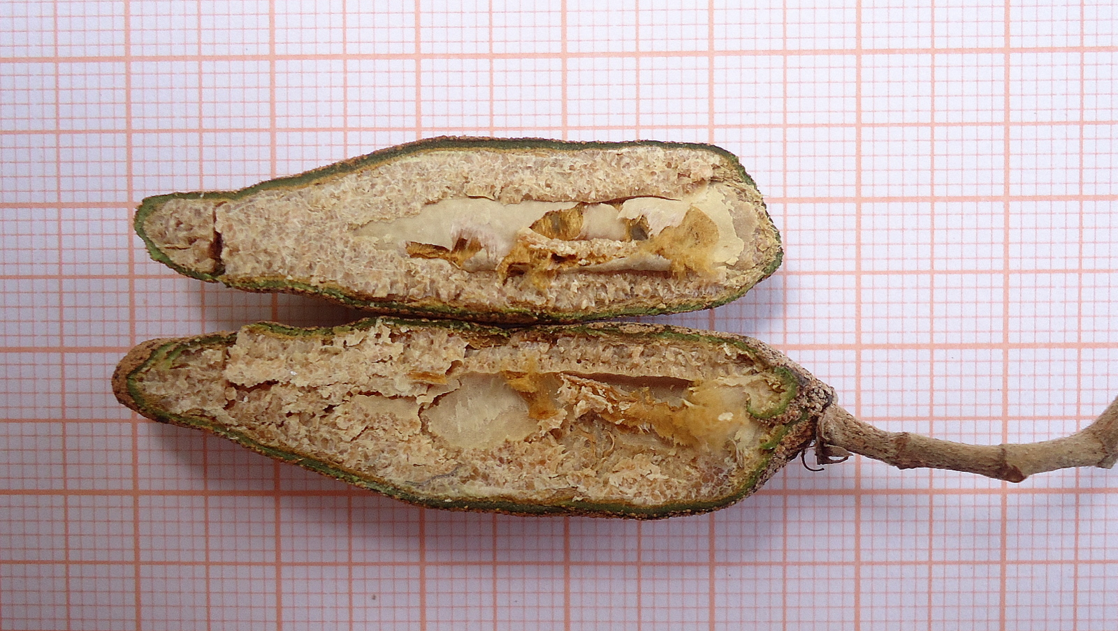 Parinari leontopitheci Prance